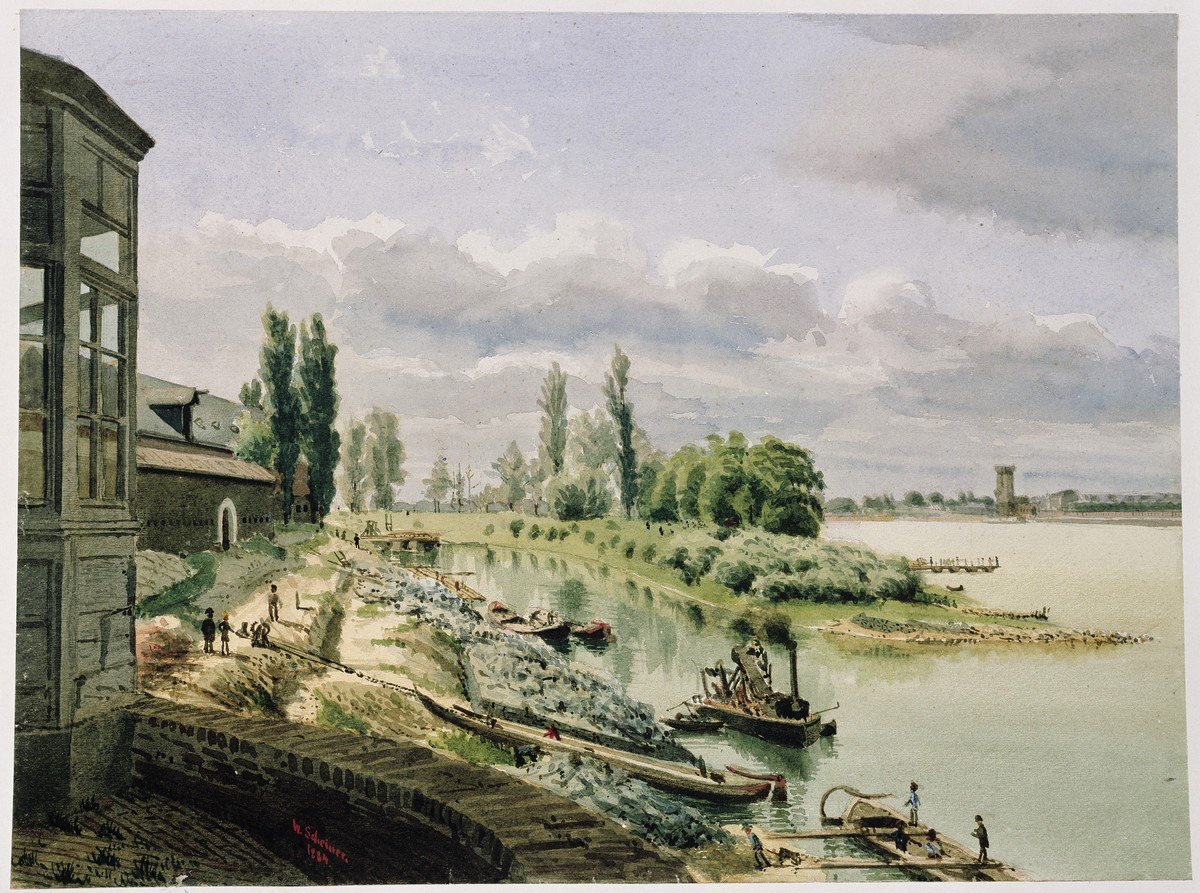 Gemälde: Hafen Deutz (1822)